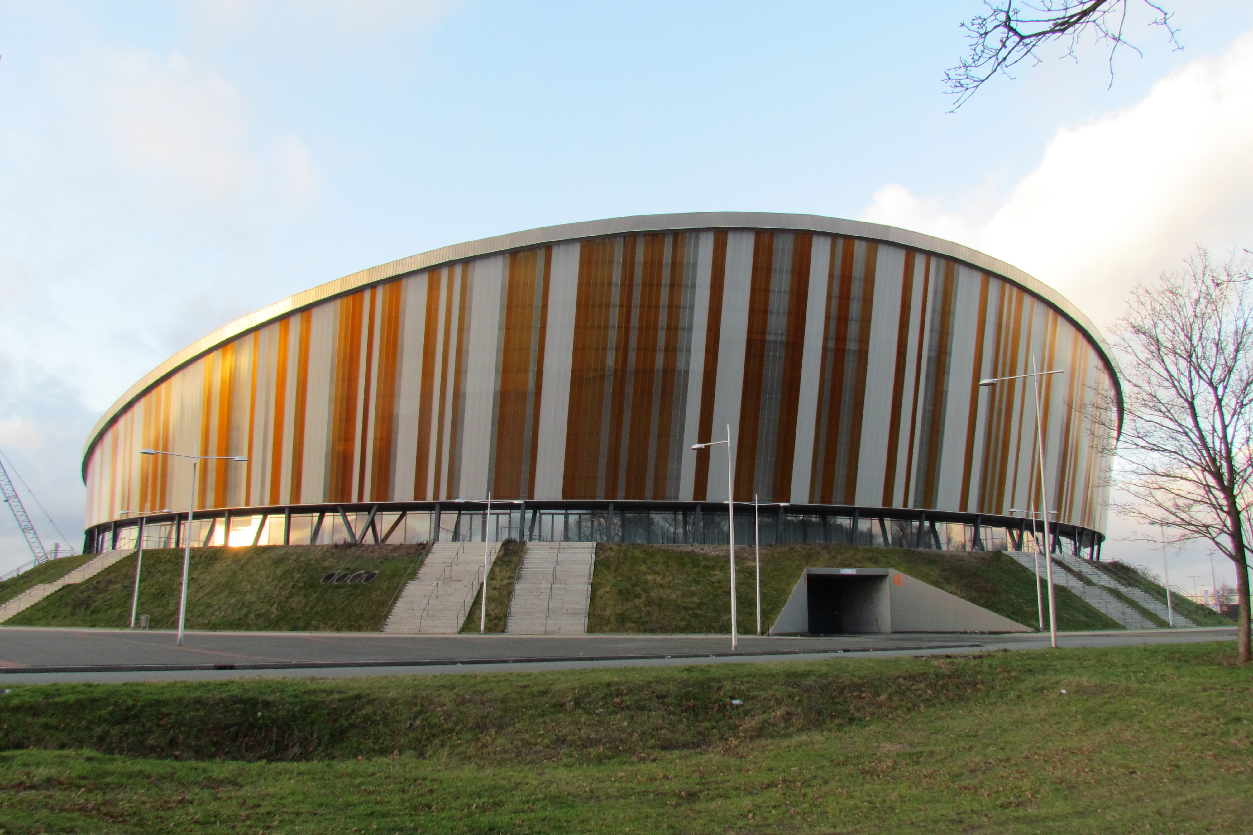 Omnisport Apeldoorn vanuit het oosten gezien